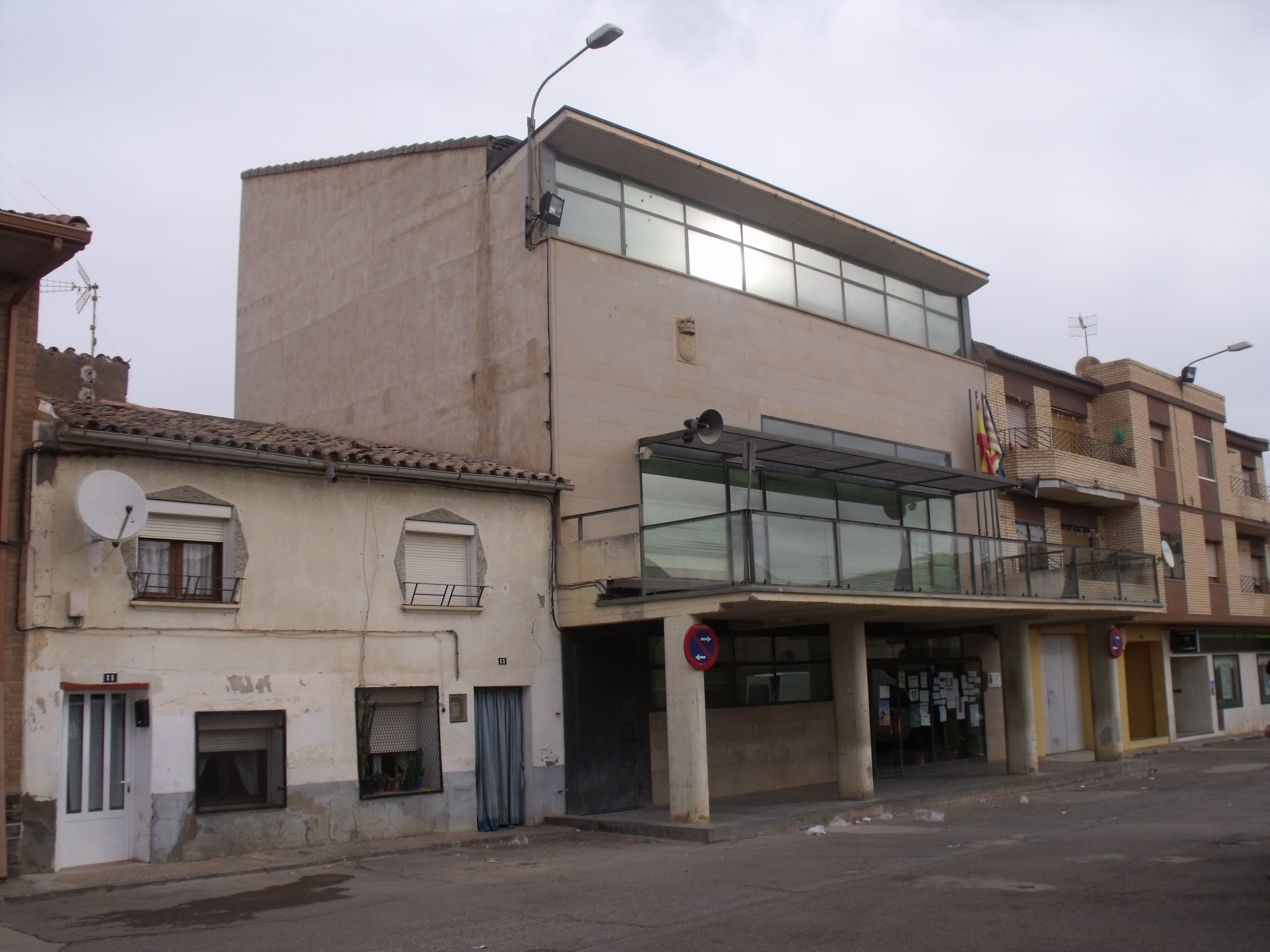 Ayuntamiento